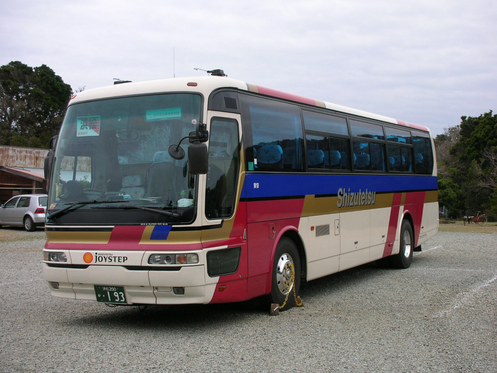 貸切バス車両（三菱ふそう車）